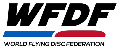 World Flying Disc Federation logo